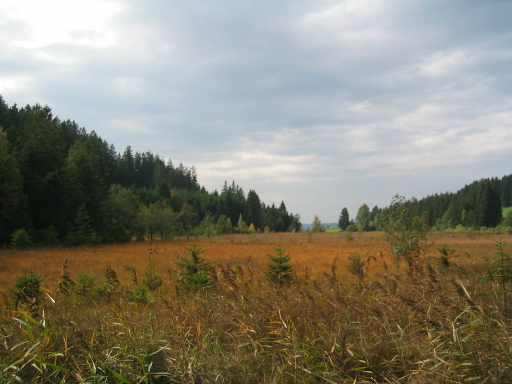 Moorgebiet um den Schlossweiher, Gemeinde Eisenberg (Ostallgäu)